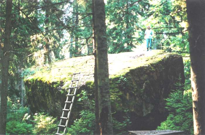 Ojakivi